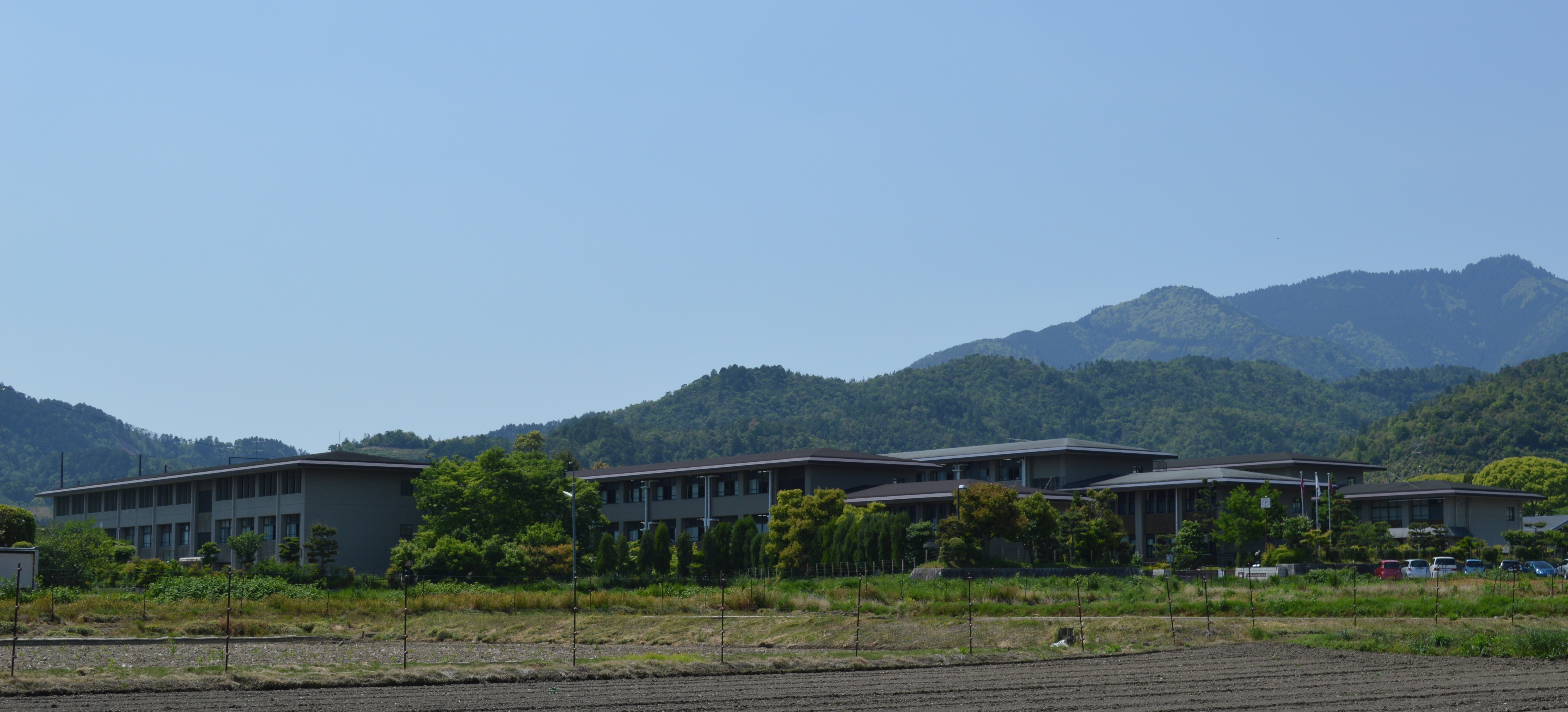 京都府立北嵯峨高校